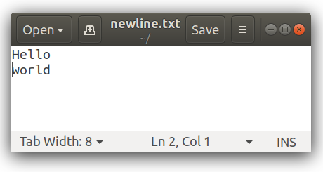 Newline inserted between Hello and world in Gedit on Ubuntu 2018.04